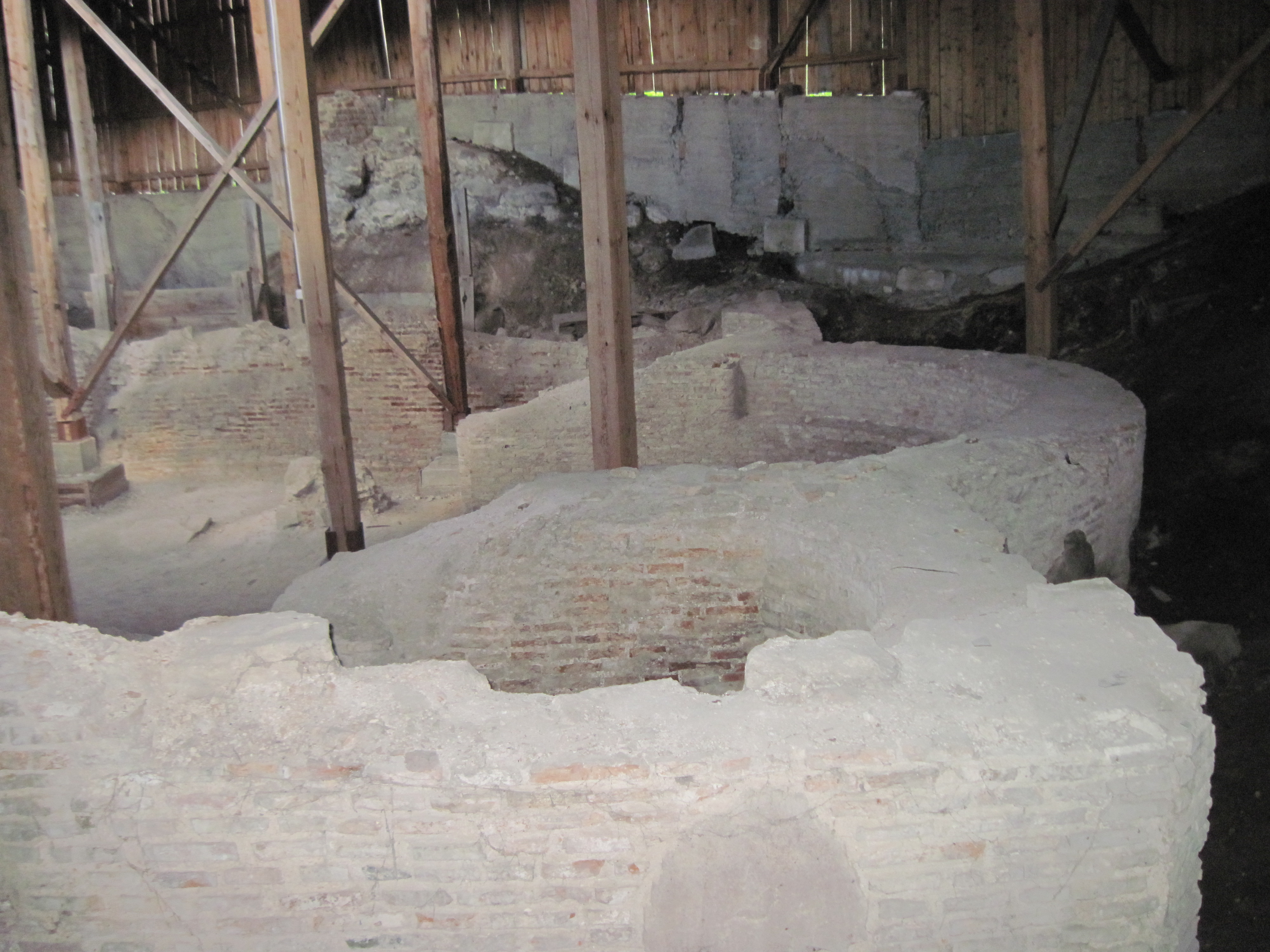 Ніжняя царква ў Гродне на тэрыторыі Старога замку. Выгляд апсід